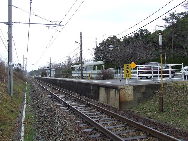 JR南羽咋駅ホーム